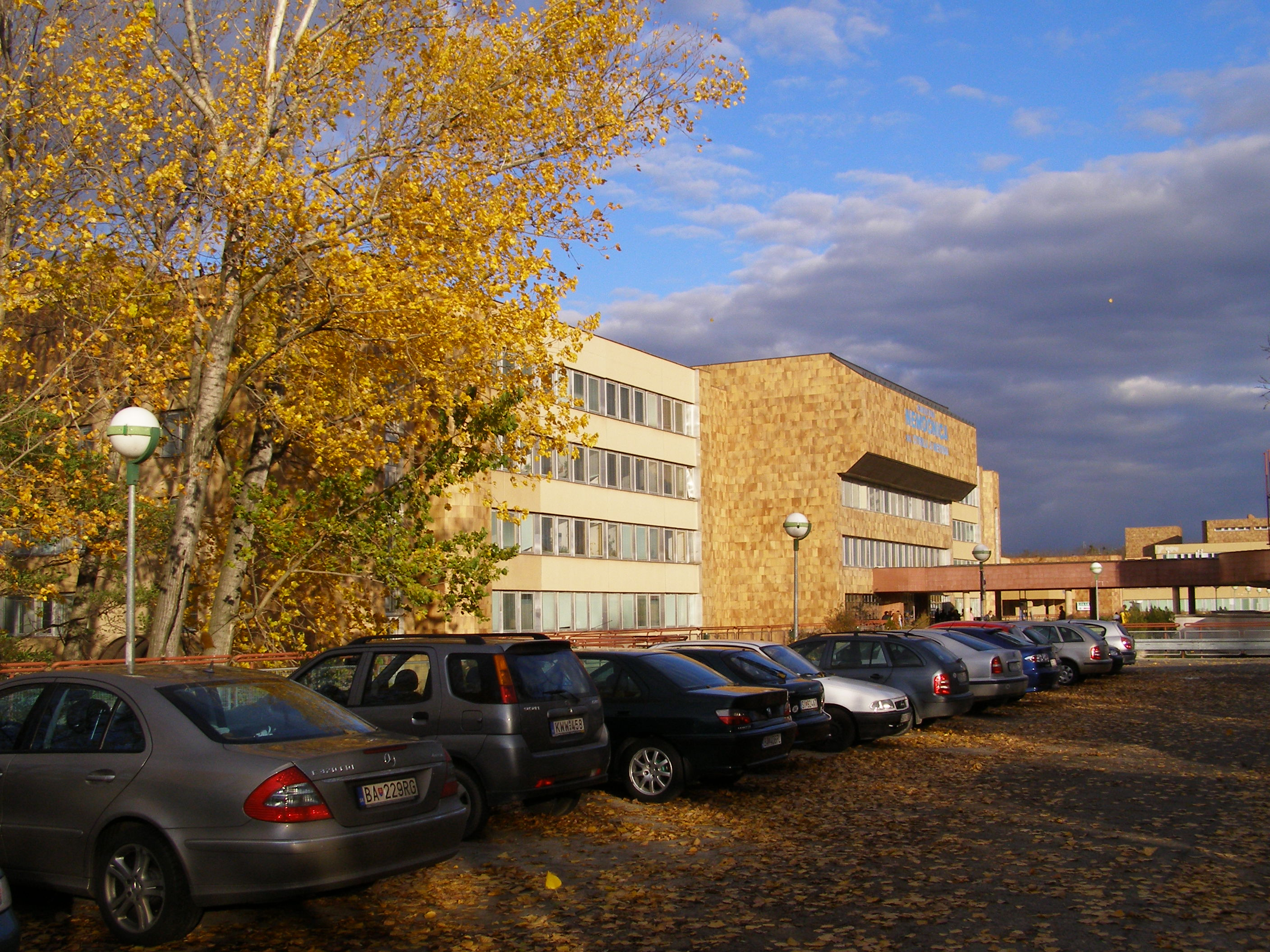 St. Cyril and Method Hospital in Petržalka, Bratislava, Slovakia